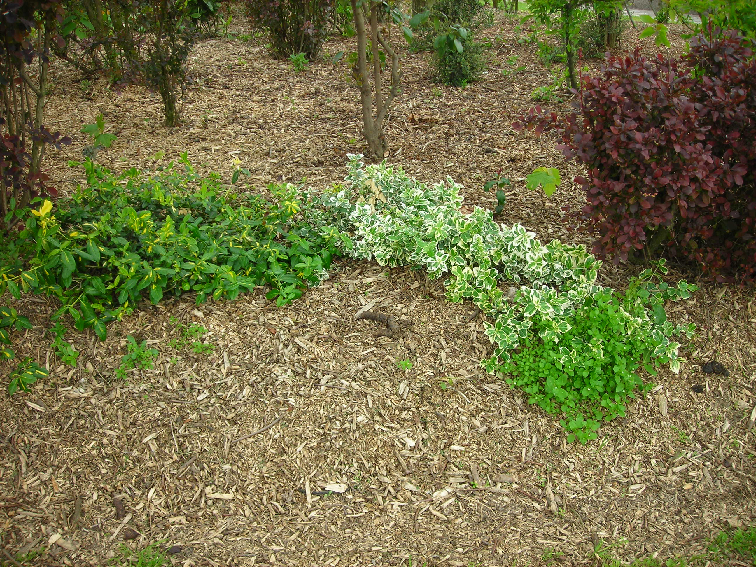 Paillage issue de déchets de taille dans un jardin public en Normandie.